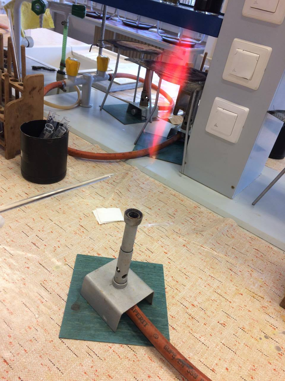 Fotografie z hodiny Laboratorního cvičení analytické chemie Střední průmyslová škola chemická Pardubice